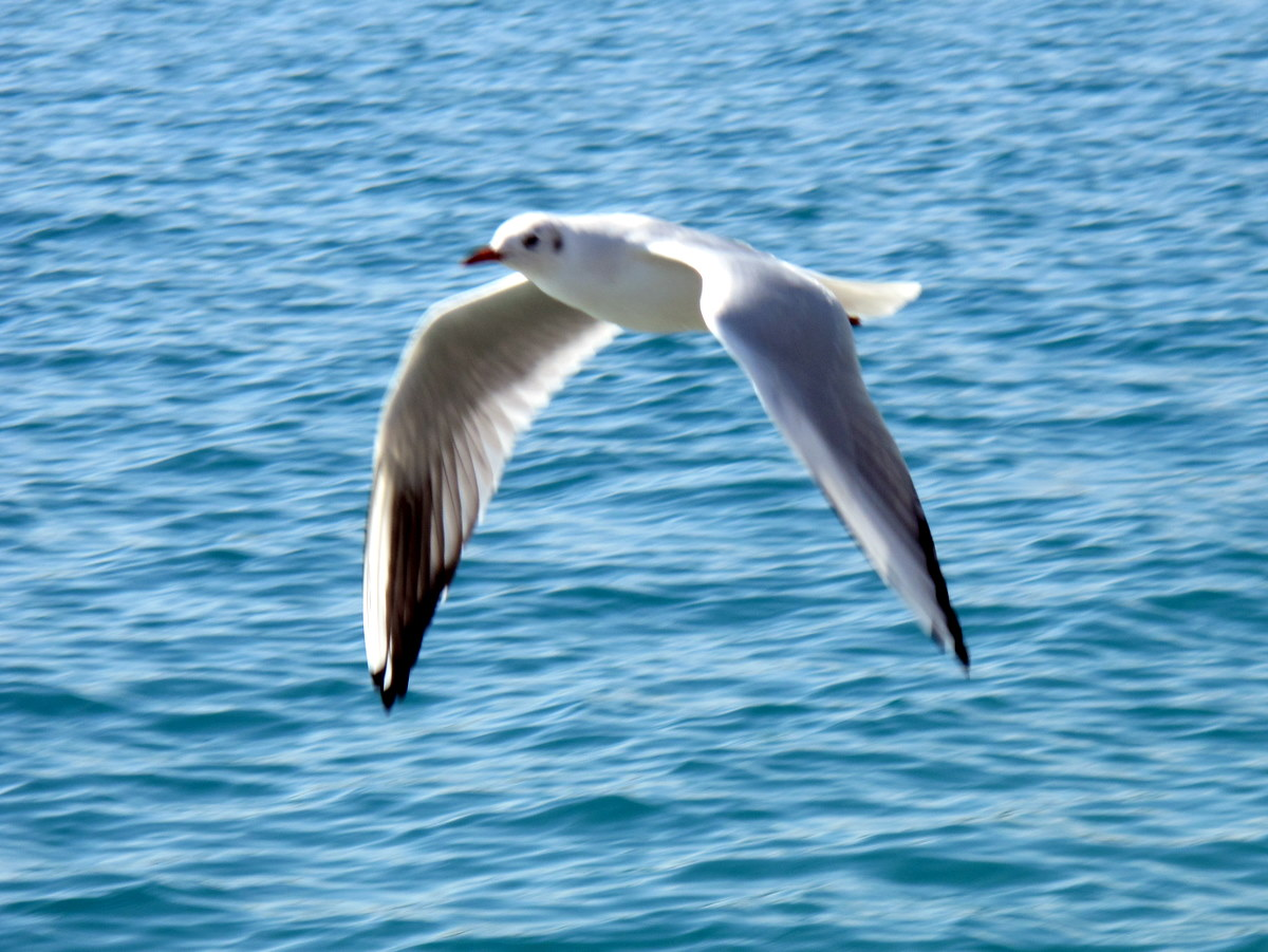 Issyk-Kol Gull